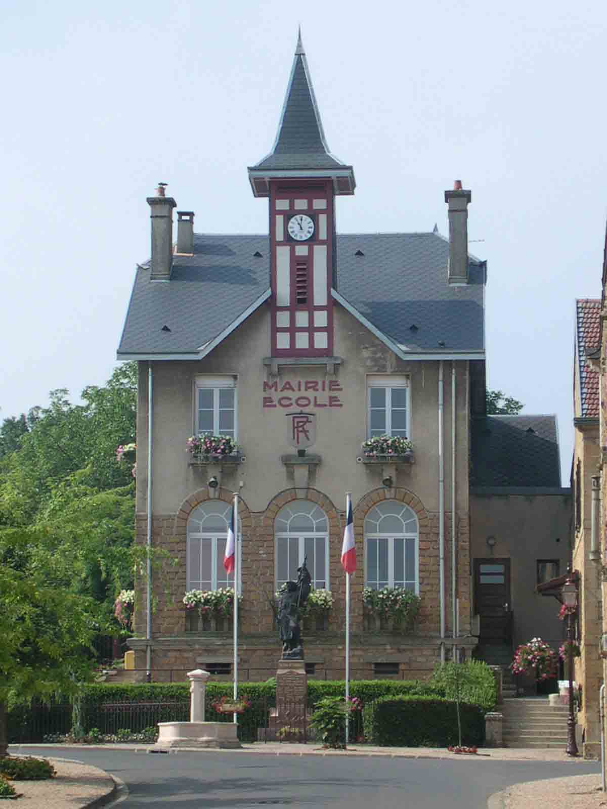 Photographie de la Mairie de Villers-sur-Bar (08) faite le 29/07/2006 à 11h00 par M. Yvon GALLOT, habitant natif du village.